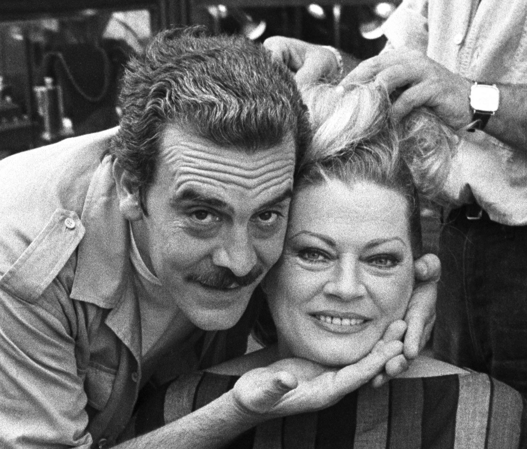 Rino Barillari, Rino Barillari's Pictures, Anita Ekberg durante il parrucco